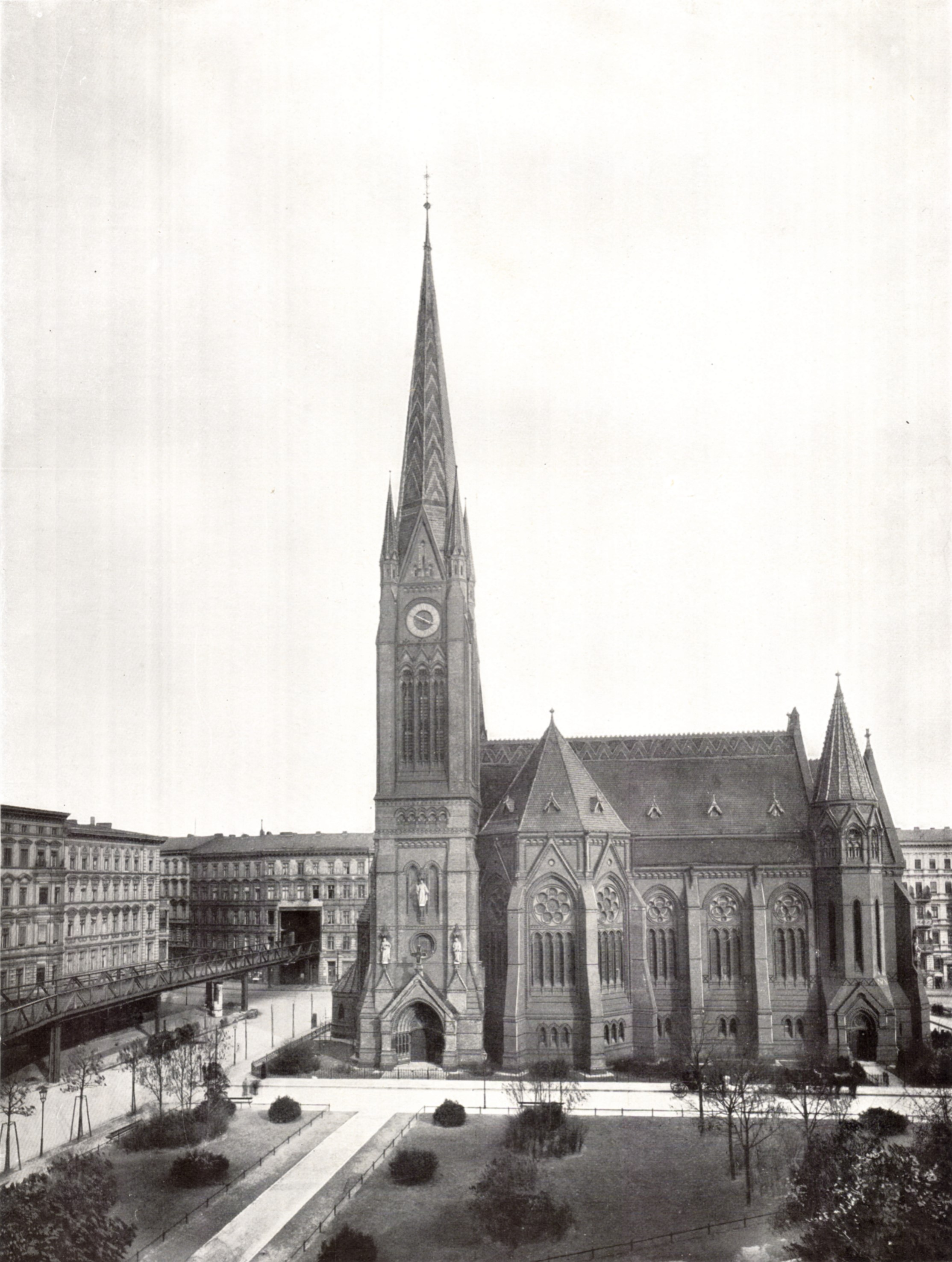 Berlin - Lutherkirche und durchbrochendes Haus der Hochbahn, um 1905